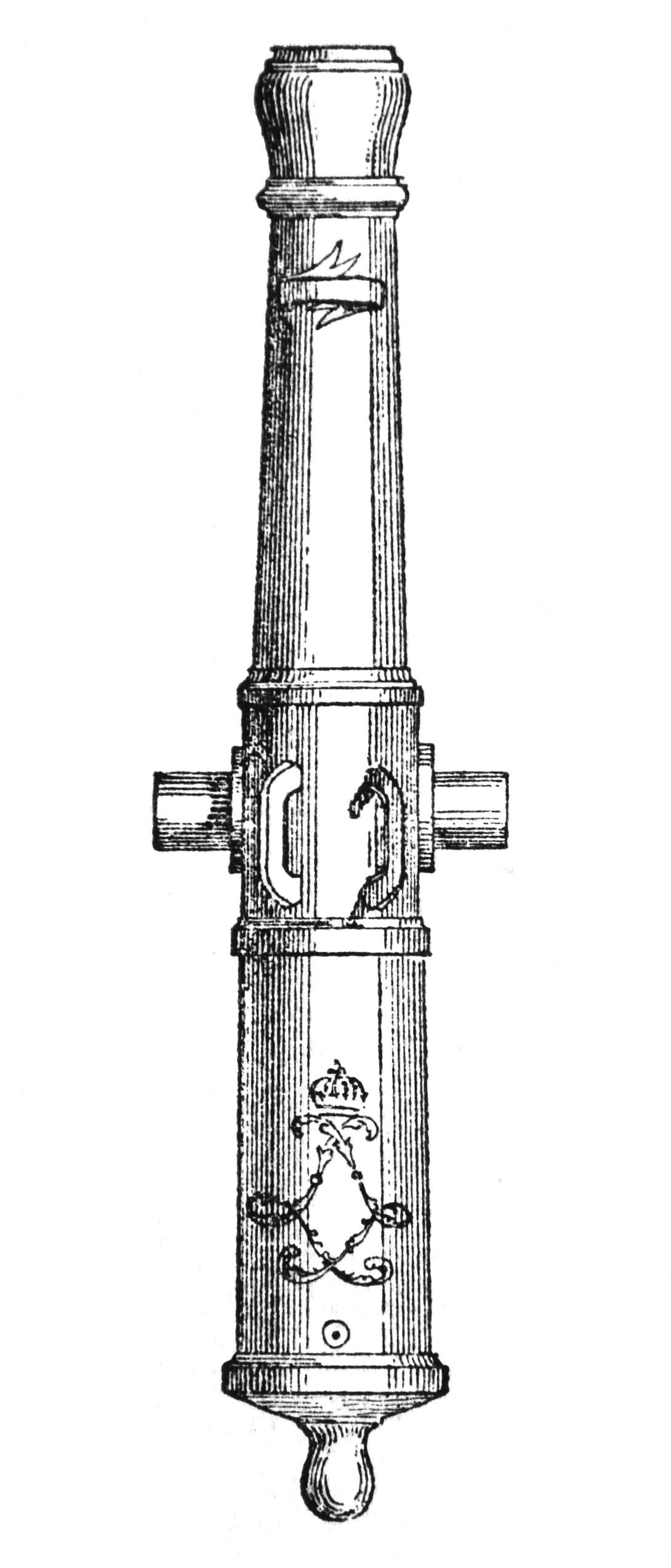 Canon de 16 Gribeauval pour les sieges